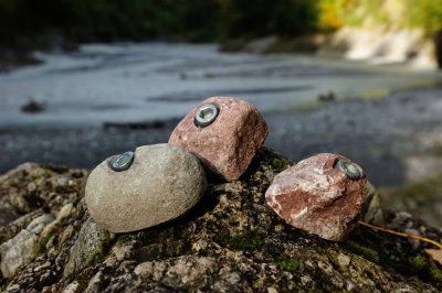 Klettergriff aus Naturstein der Firma Alpikuna OG